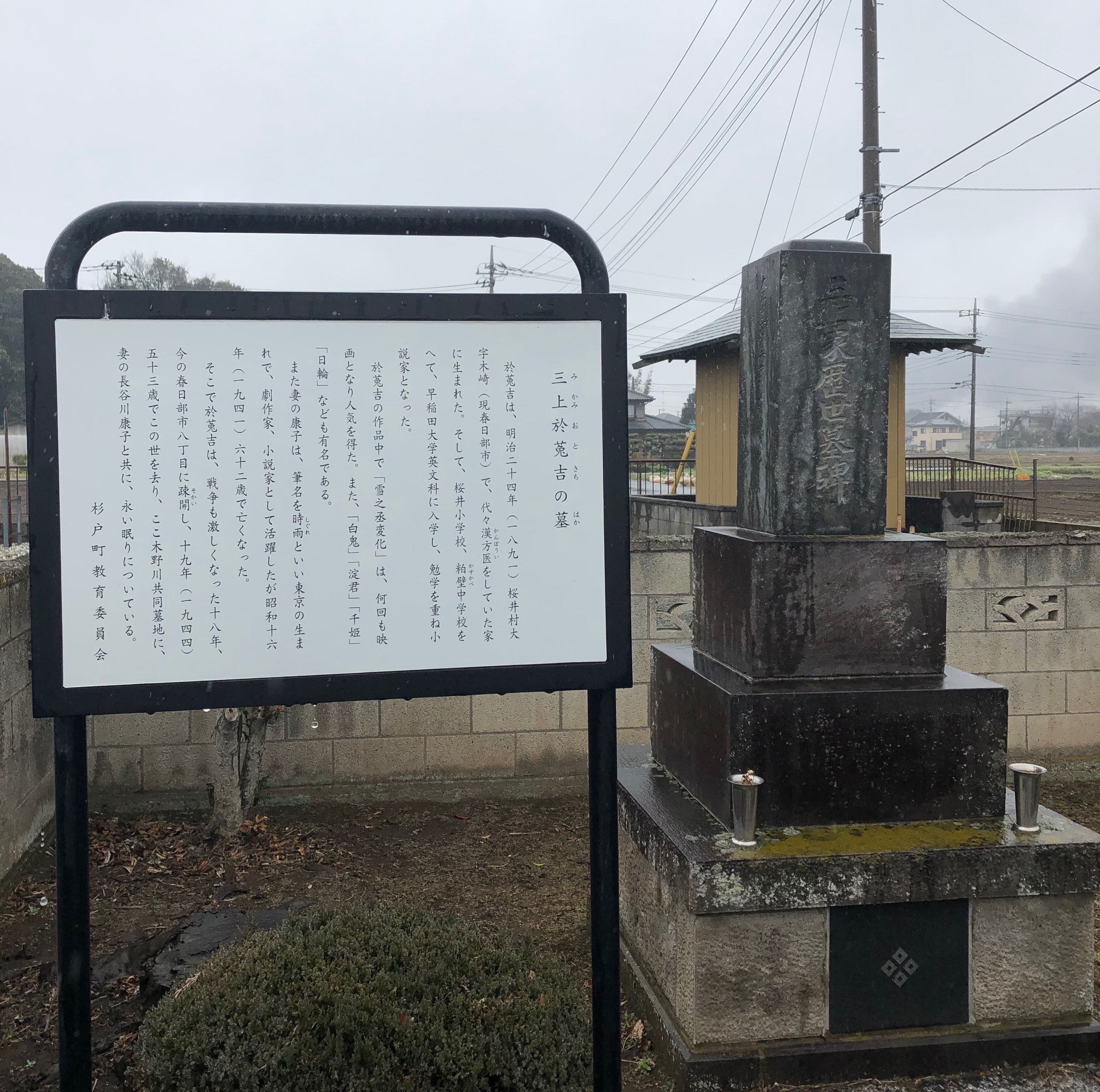 埼玉県杉戸町 木野川共同墓地